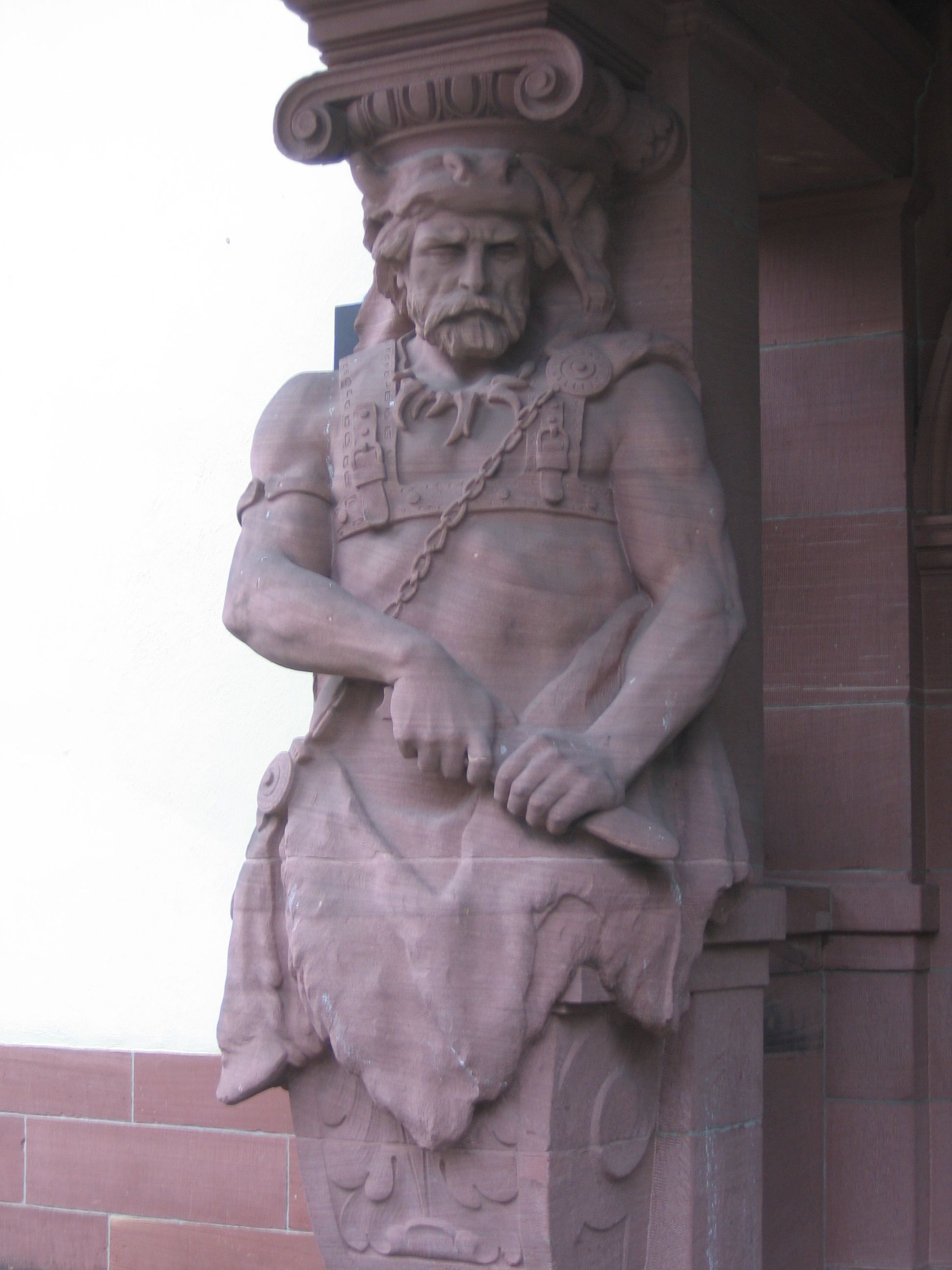 Empfangsgebäude Kaiser Wilhelms II. in Bad Homburg; Detail: Arminius